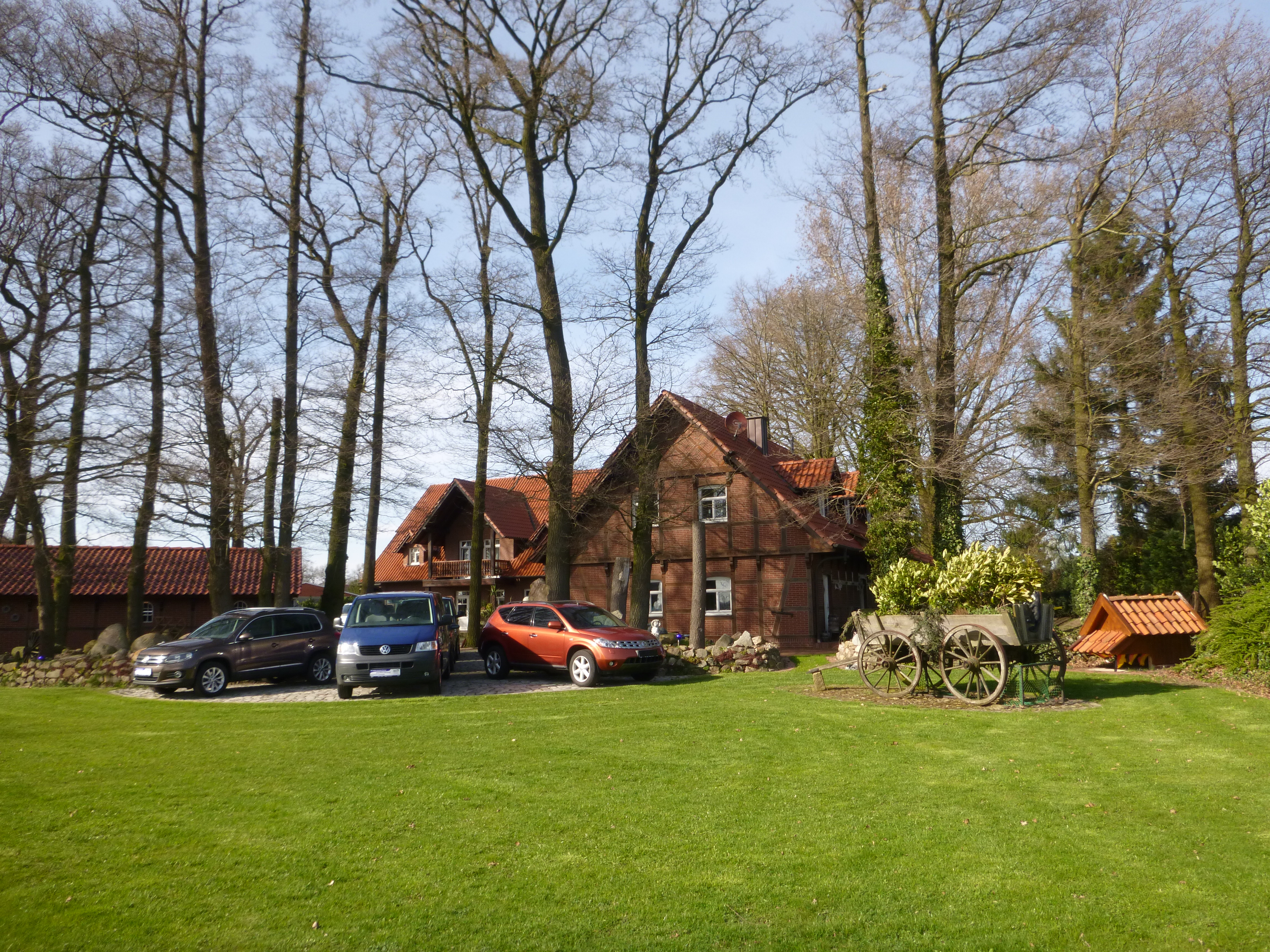 "emslanda aŭtovendejo" en Handrup, Malsupra Saksio, Germanio